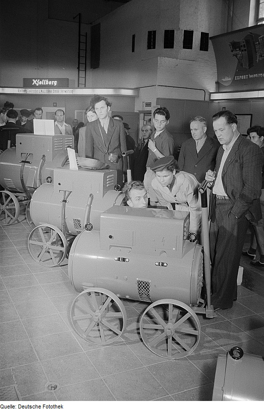 Original image description from the Deutsche Fotothek Elektrotechnische Exponate auf der Leipziger Herbstmesse 1954